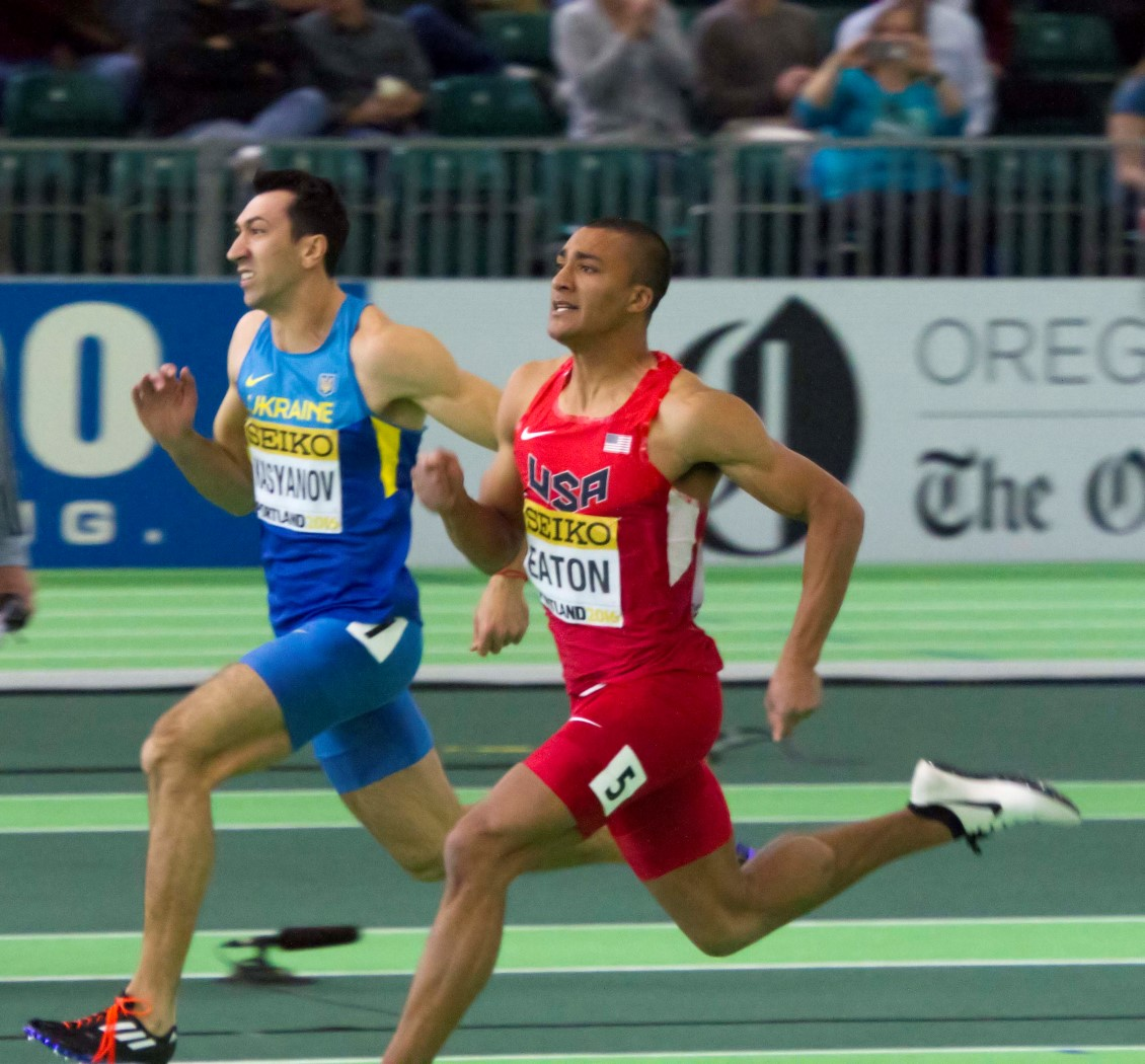 064 kasyanov ashton eaton